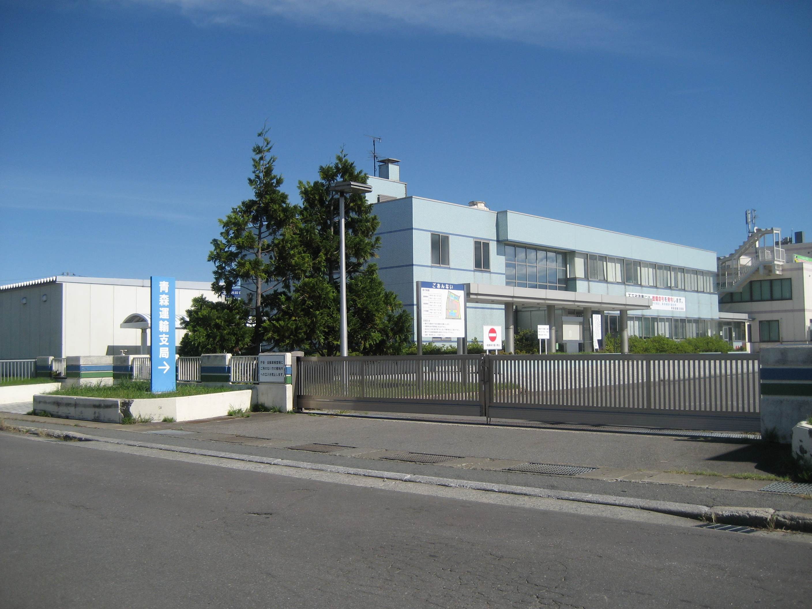 青森運輸支局庁舎